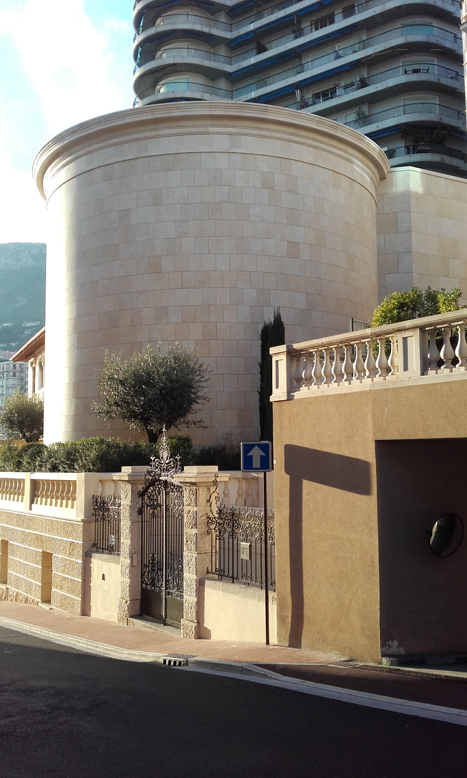 Principauté de Monaco. Nouvelle synagogue à l'angle de la rue du général Rampont (n°28) et de la rue du Fossé. Suite à la démolition de l’ancienne synagogue implantée dans la villa "Esmeralda", une nouvelle construction a été réalisée pour le compte de l’Association Culturelle Israélite Monégasque (ACIM). Il s'agit d'un bâtiment "tour" de quatre niveaux, d'une hauteur totale d'environ 12 mètres, réalisé en maîtrise d’ouvrage déléguée par le groupe J.B. Pastor & Fils, et conçue par l’Architecte Thierry Despont en collaboration avec Suzanne Belaieff.